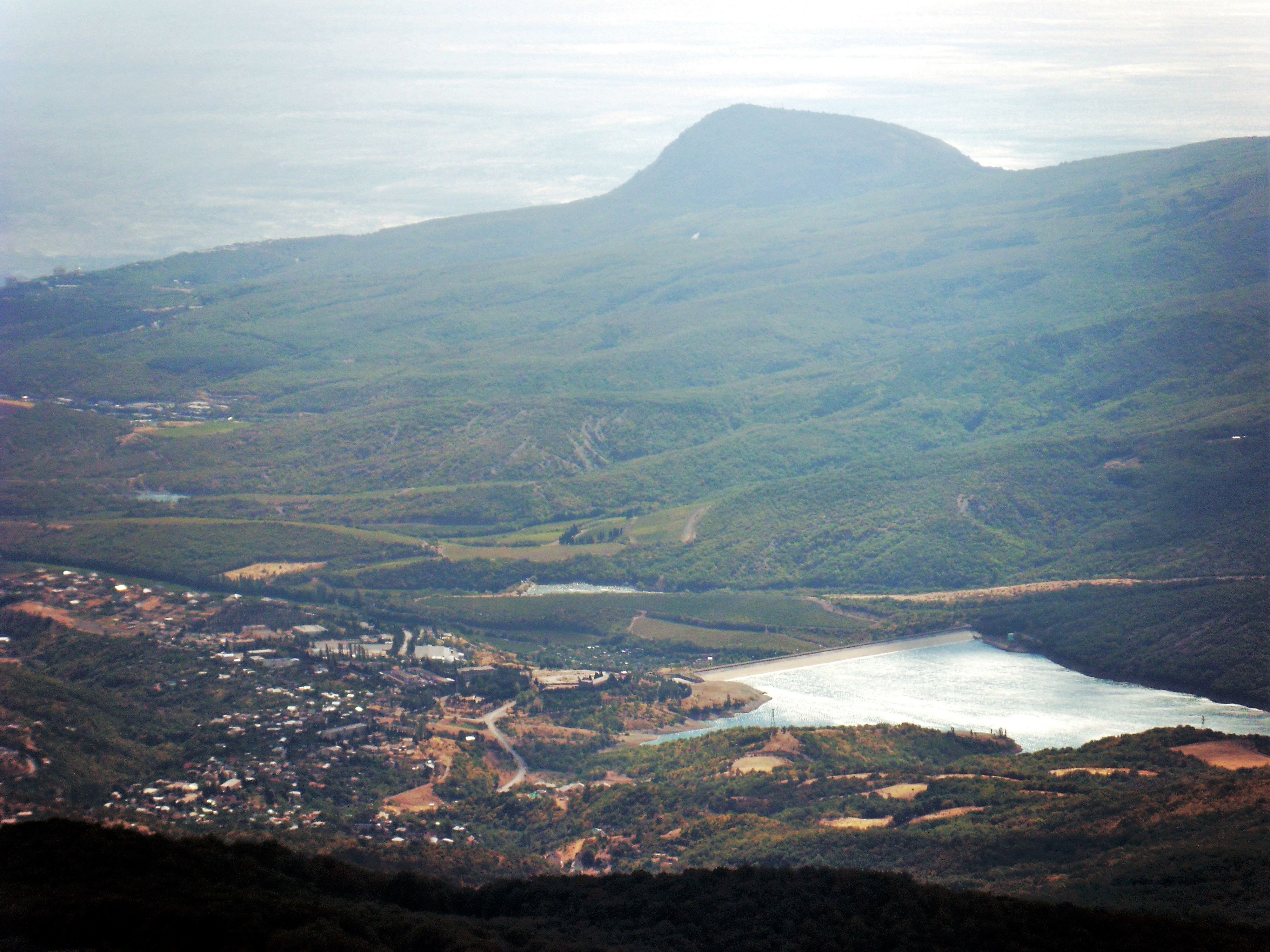 Ізобільне: Фото